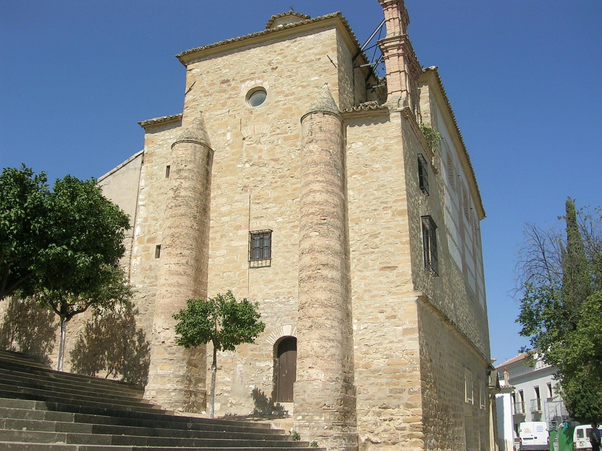 Santuario de las Sagradas Reliquias, en Arjona, Jaén, España.